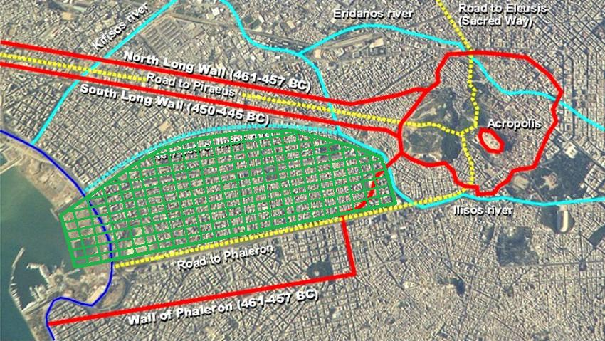 Kallithea en verd, les muralles antigues en roig.